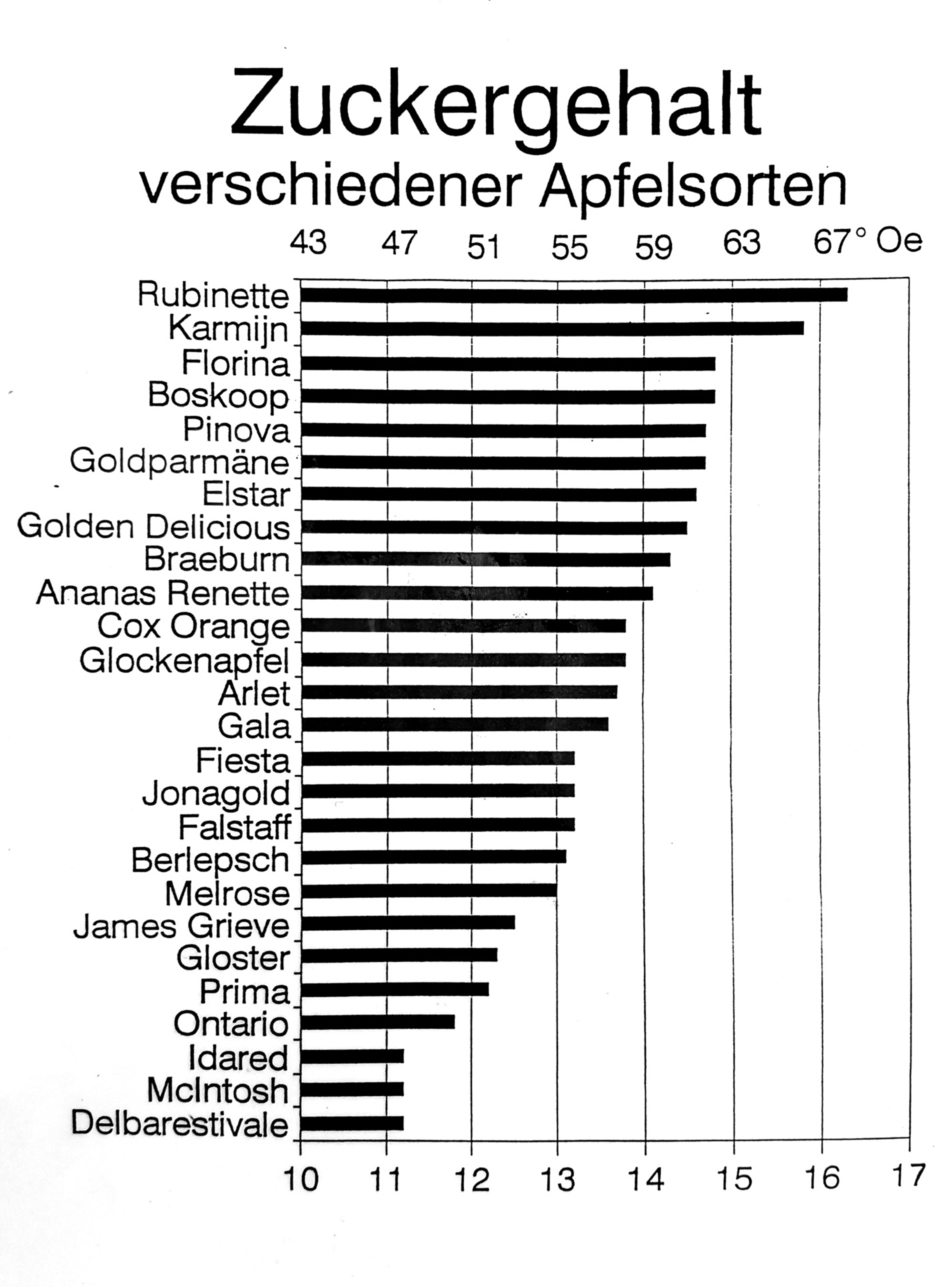 Landesgartenschau Öhringen 2016 - Cappelrain. Äpfel verschiedener Apfelbäume werden verglichen: Liste mit dem Zuckergehalt verschiedener Apfelsorten. Weitere Vergleichskriterien: Säuregehalt verschiedener Apfelsorten und Vitamin C-Gehalt verschiedener Apfelsorten.